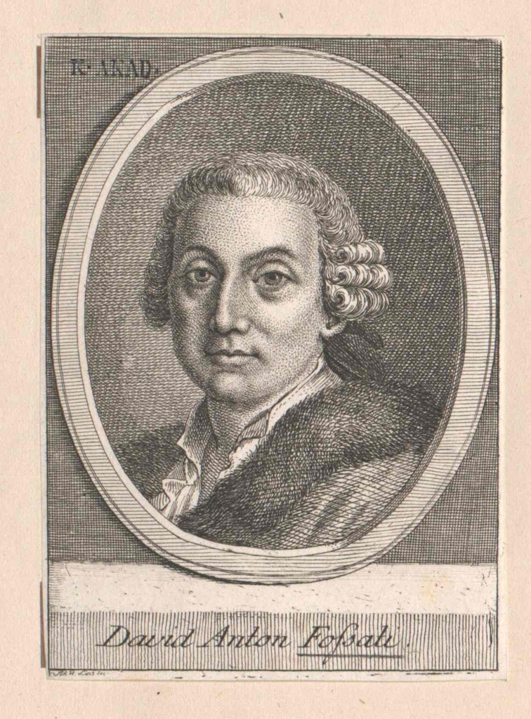 David Anton Fossati, der Stecher ist in der Legende angegeben